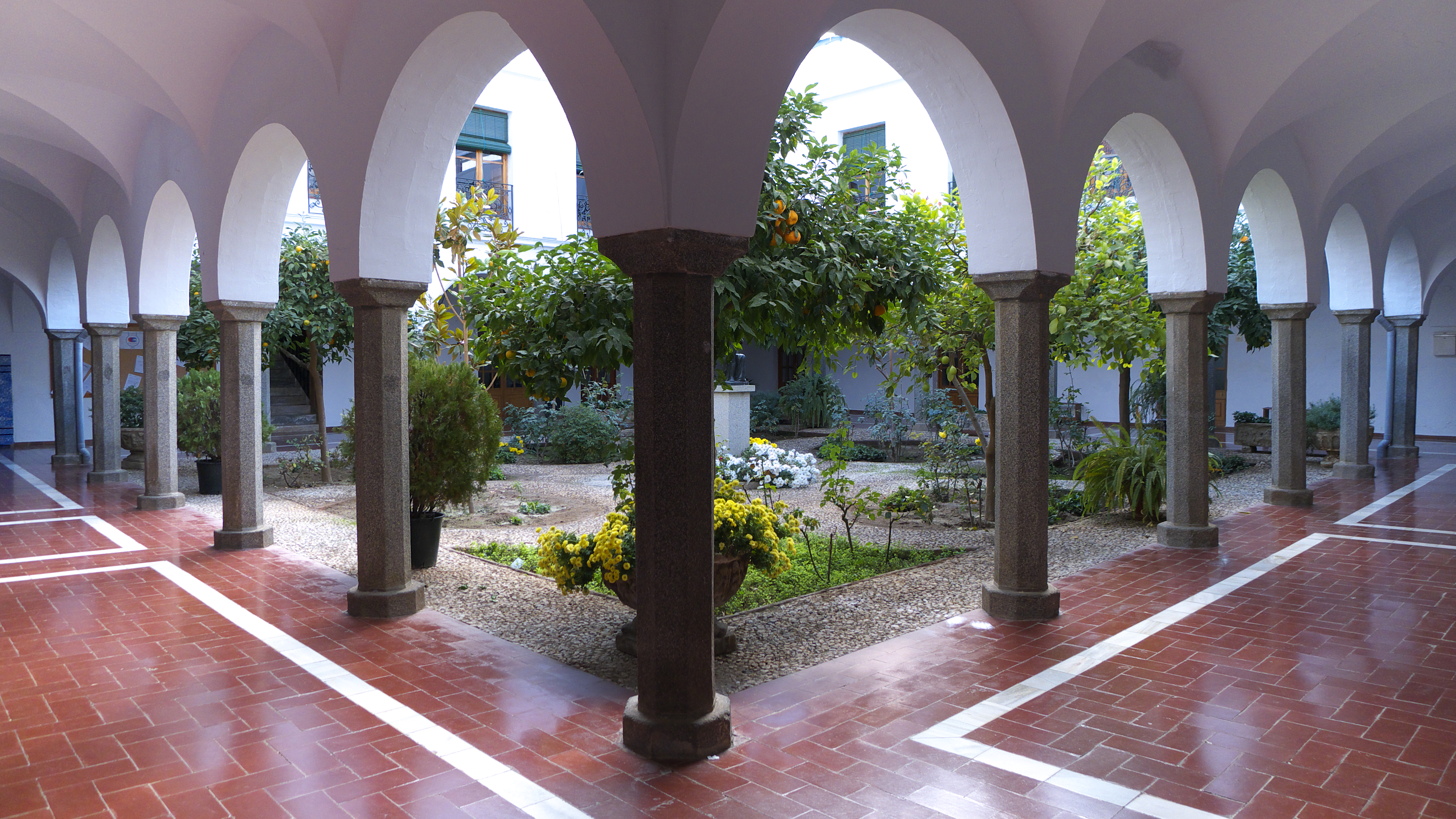 A principios del siglo XVI, Los Santos de Maimona era una importante Encomienda de la Orden de Santiago.